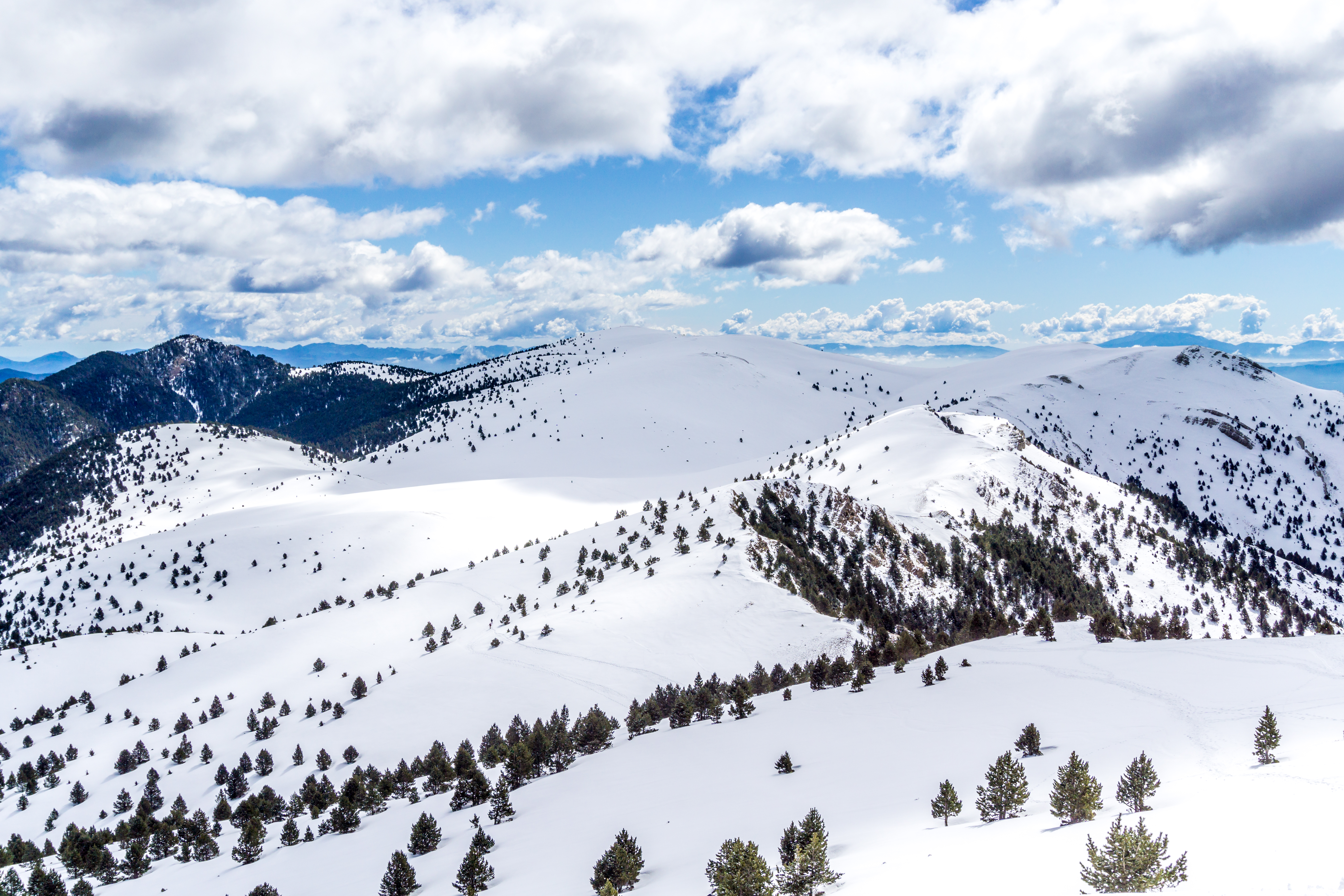 Vista de la serra d'Ensija nevada des del seu punt més alt, el cim de la Gallina Pelada